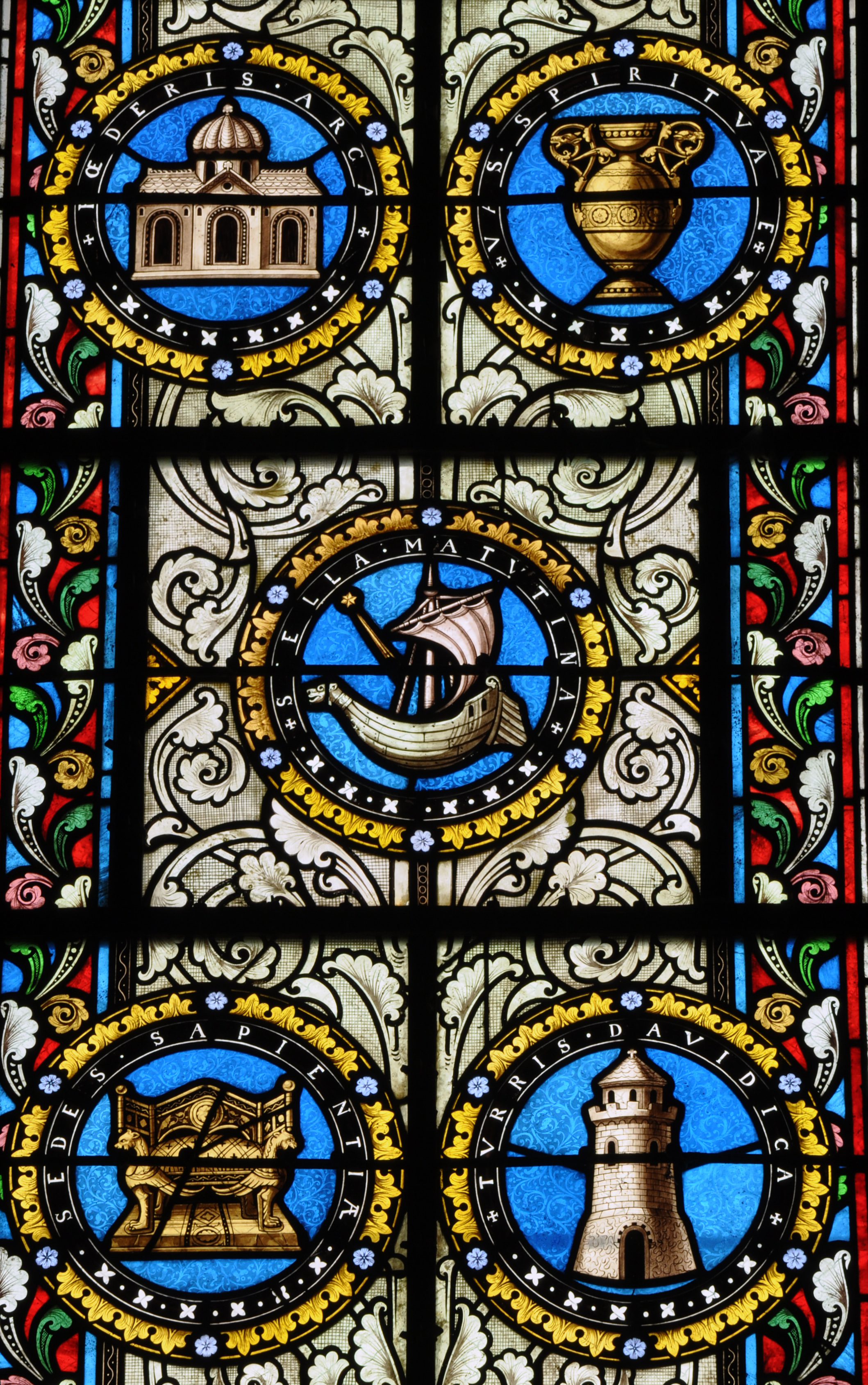 Vitrail de l'église Saint-Pierre-et-Saint-Paul à Orbais l'Abbaye, chapelle absidiale. Vitrail néo-gothique : les litanies de le Vierge.